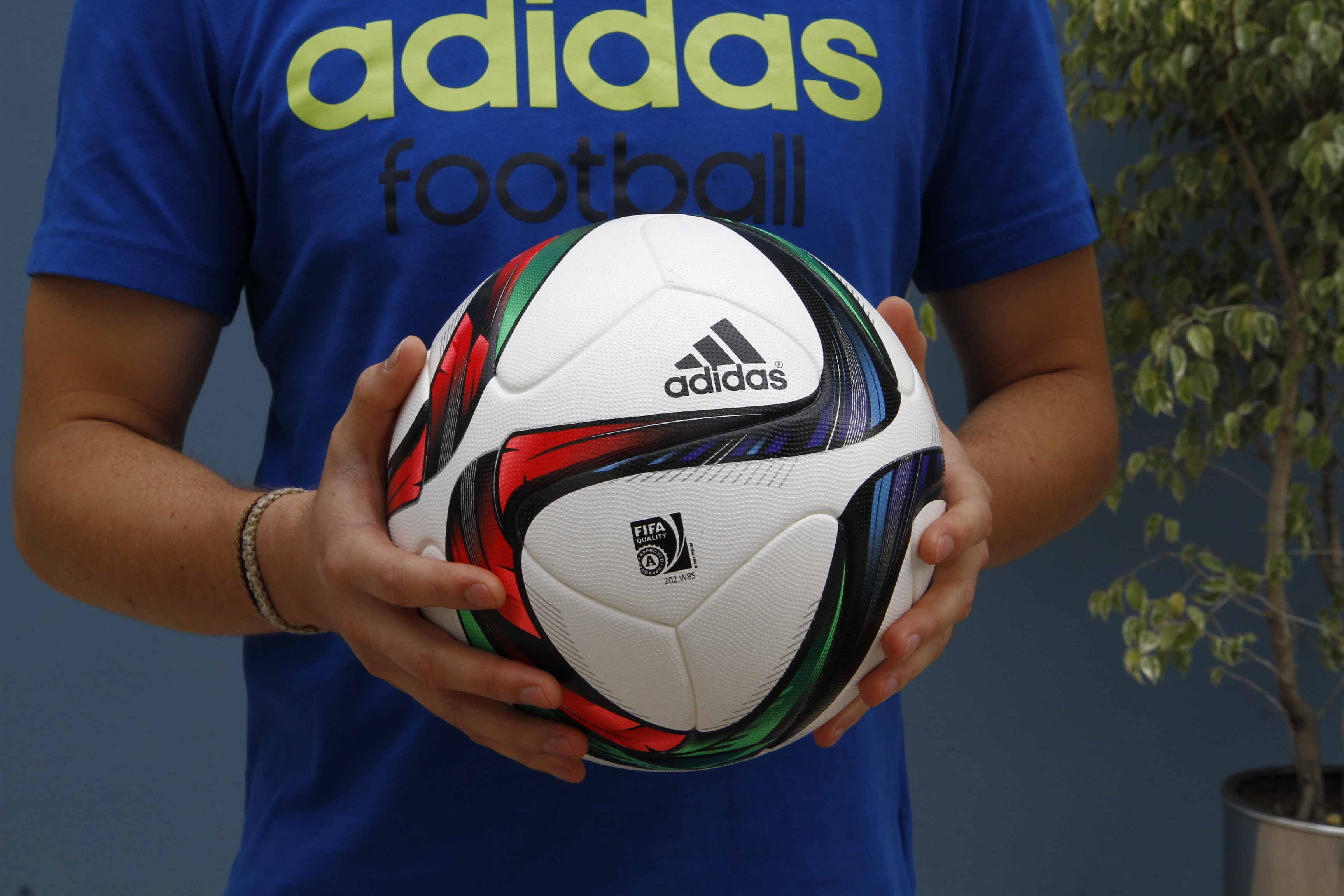 Quito, Ecuador, 29 ene (ANDES).- Adidas presentó el Balón oficial del Campeonato Nacional de Fútbol llamado Conext 15 . Foto: Micaela Ayala V./ANDES